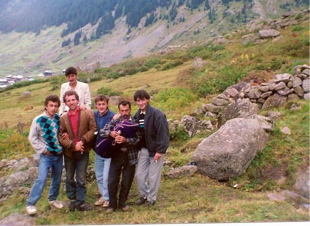 Bir zamanlar Hemşin gençliği tulumla pungarın başında elevit köyü